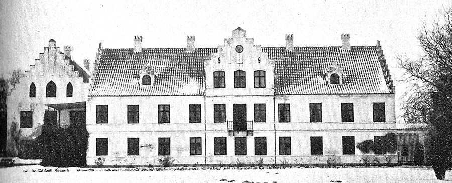 Bjørnemose var oprindelig en bondegård, som må have vært i kronens besiddelse, for første gang man hører om gården er i 1531, da Christian 3. overlod den på livstid til Hans Ottesen. Bjørnemose er en Sædegård og ligger i Tved Sogn, Sunds Herred, Svendborg Kommune. Hovedbygningen er opført i 1745-1756 og tilbygget i 1854.